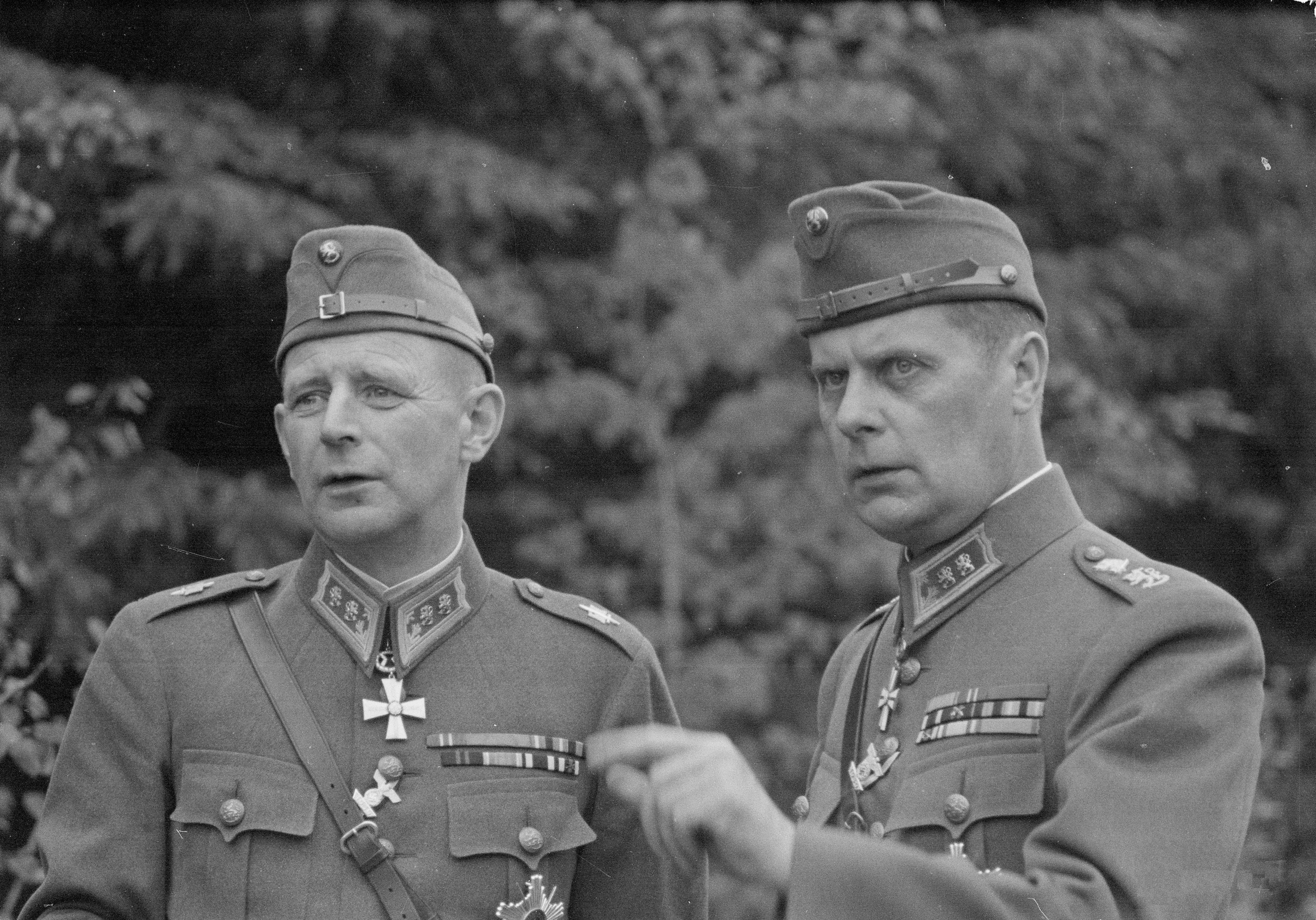 Päämajan linnoitusosaston päällikkö kenraaliluutnantti Edvard Hanell ja päämajan komentoesikunna päällikkö kenraaliluutnantti W. E. Tuompo. Kuvattu A. Hitlerin vieraillessa marsalkka Mannerheimin 75-vuotissyntymäpäivillä.